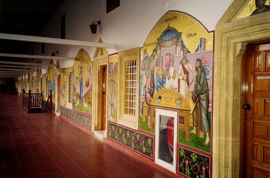 Monasterio de Kikkos. Galería interior. Troodos. Chipre. Imagen tomada por el cargador. Año 1998.